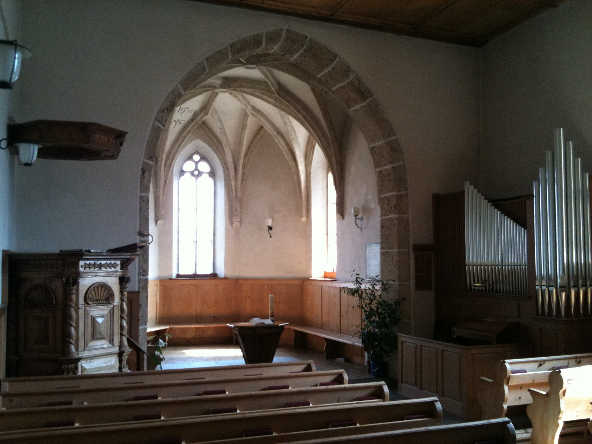 reformierte Kirche Masein, Kanton Graubünden